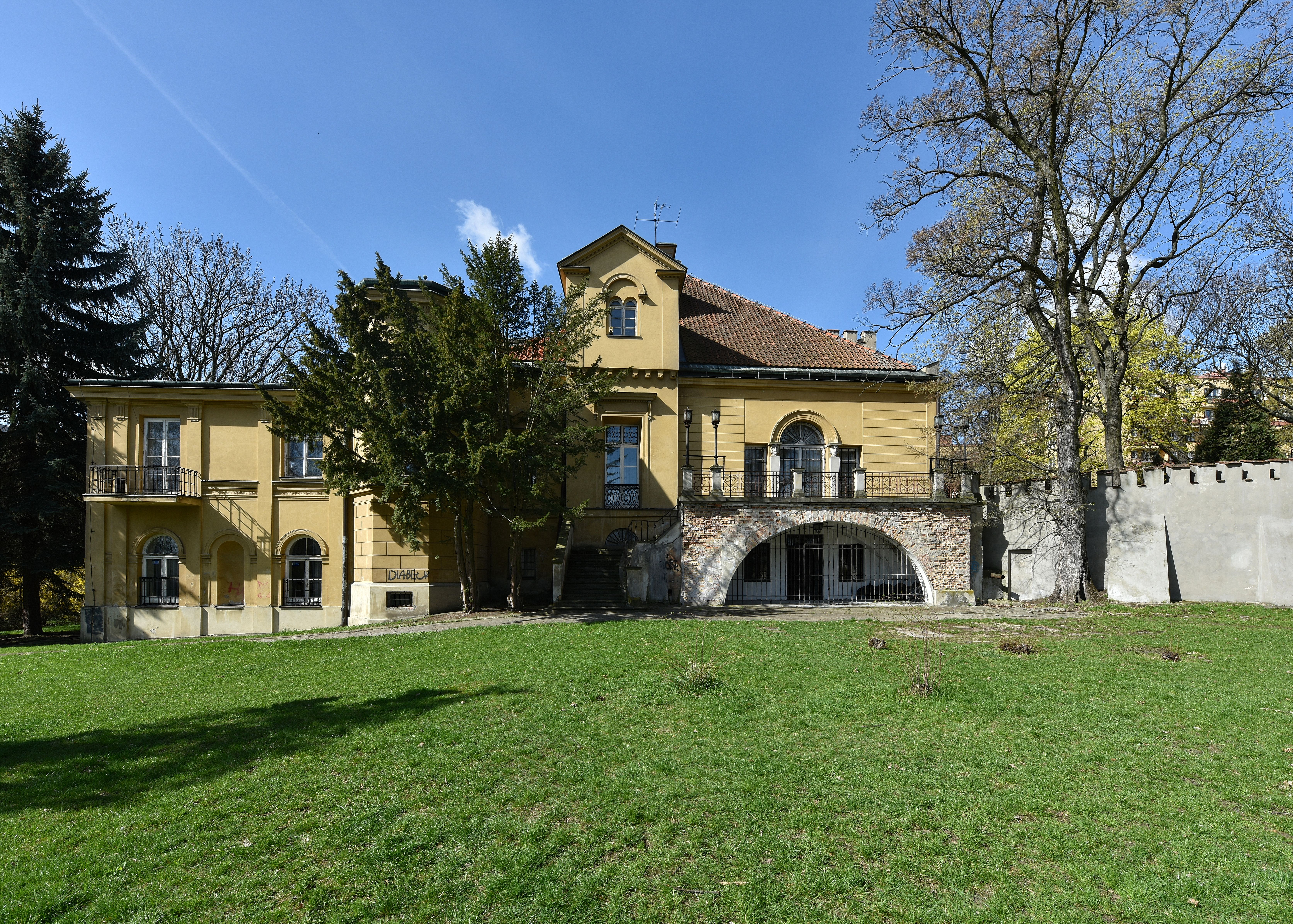 Pałac Szustra w Warszawie